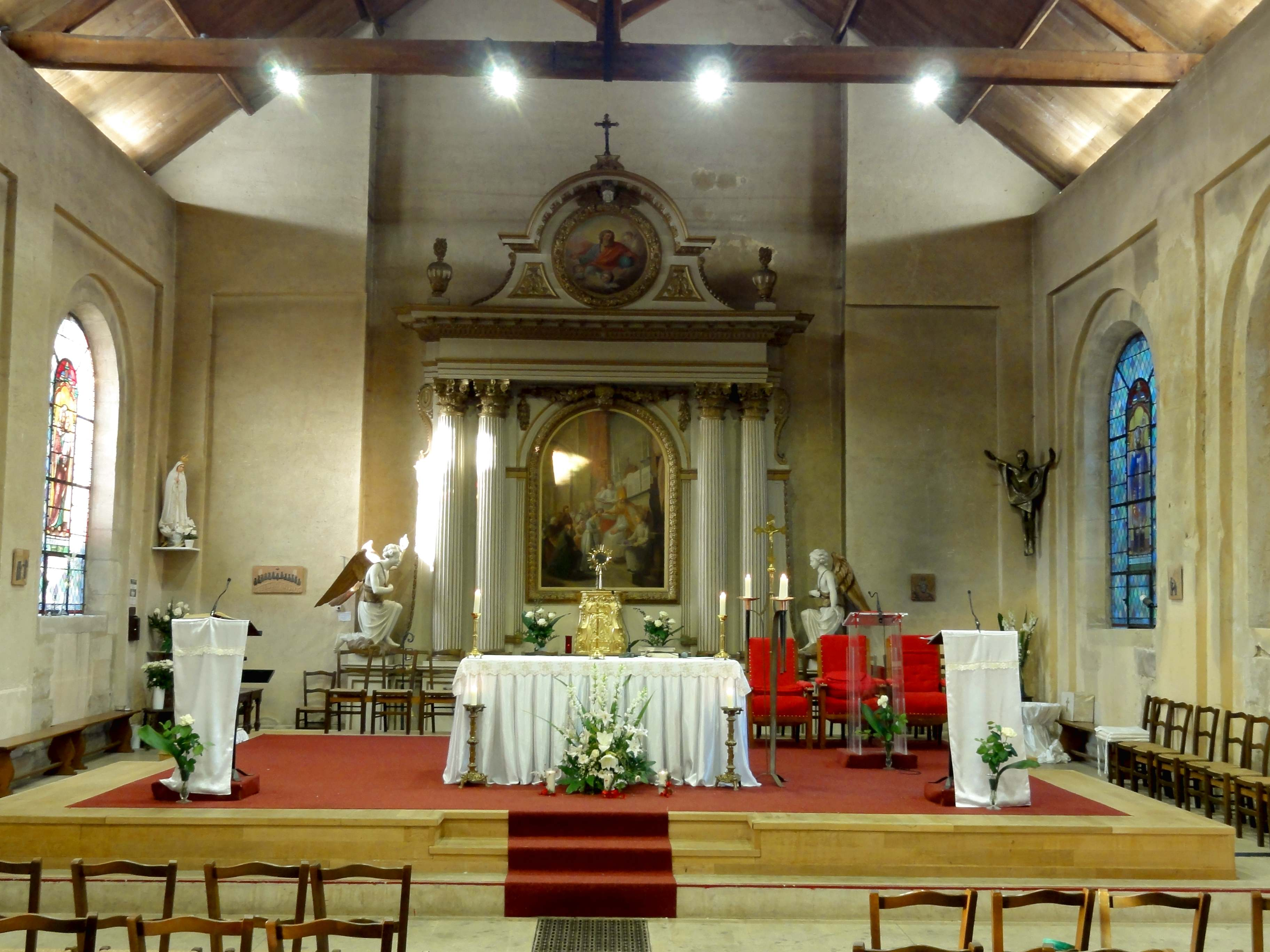 Intérieur, vue vers l'ouest.